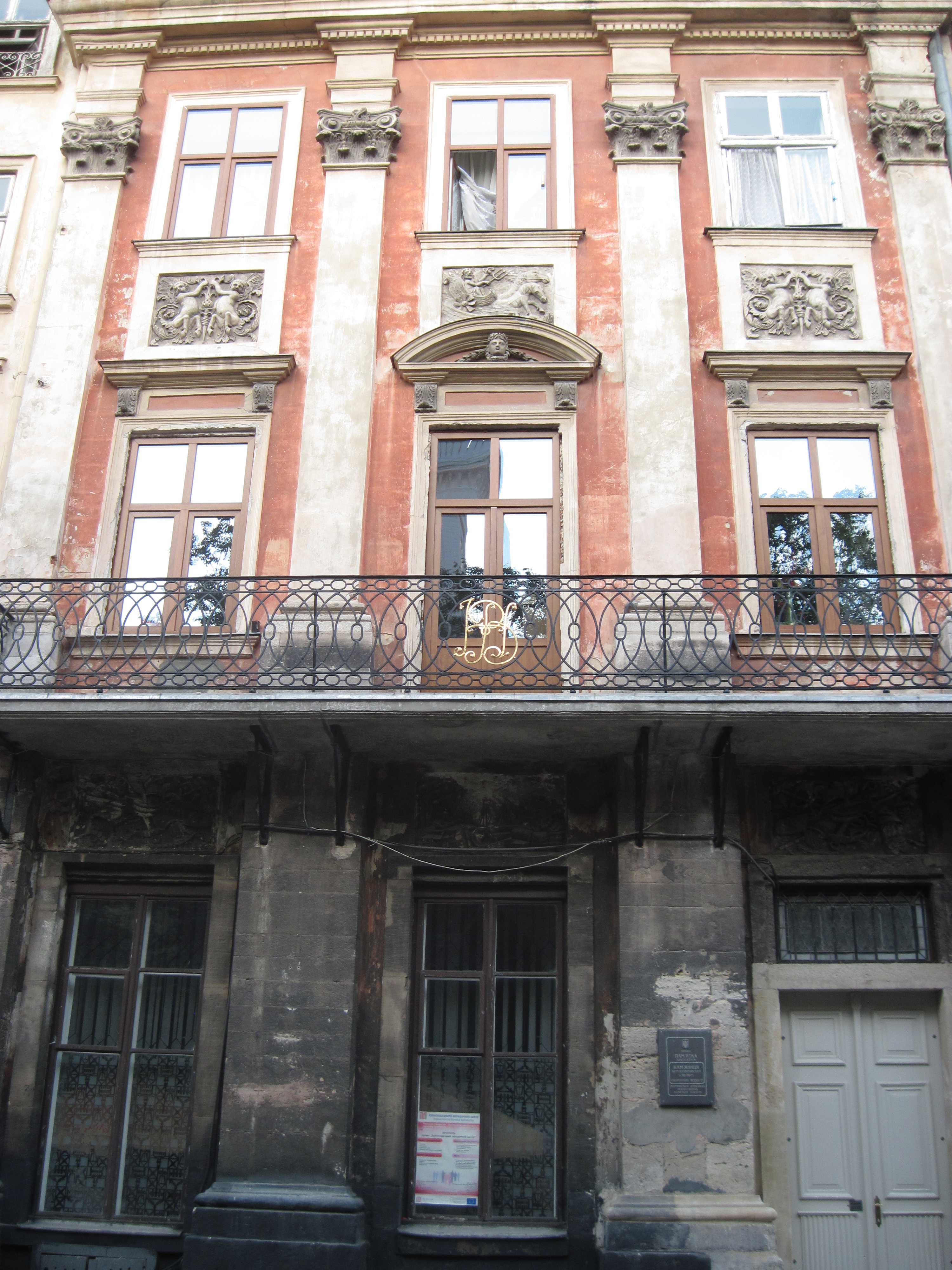 Кам'яниця №8, Ринок, Львів